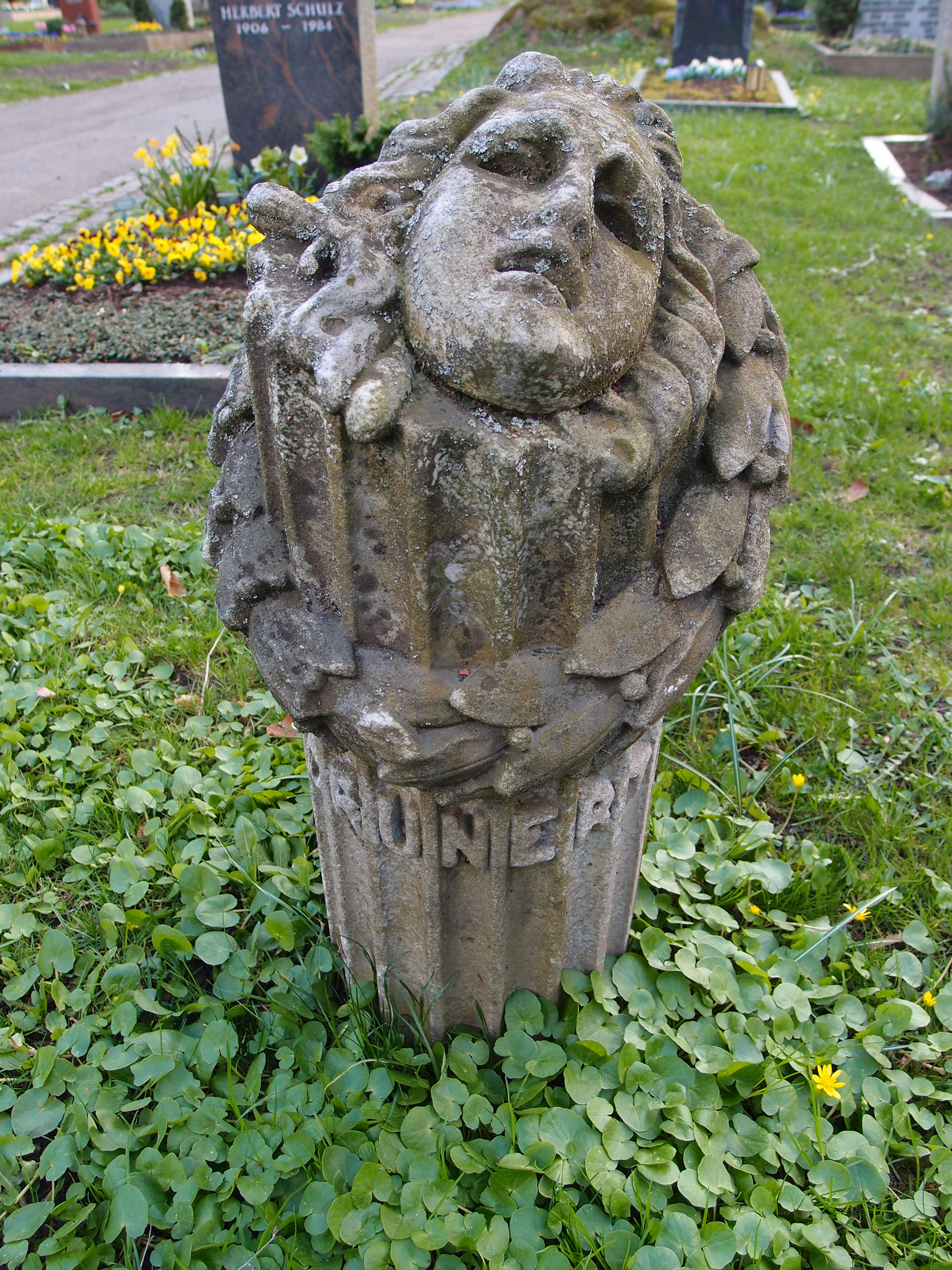 Grabstein von Karl Grunert (1810-1869) auf dem Stuttgarter Fangelsbachfriedhof, Abteilung 10.